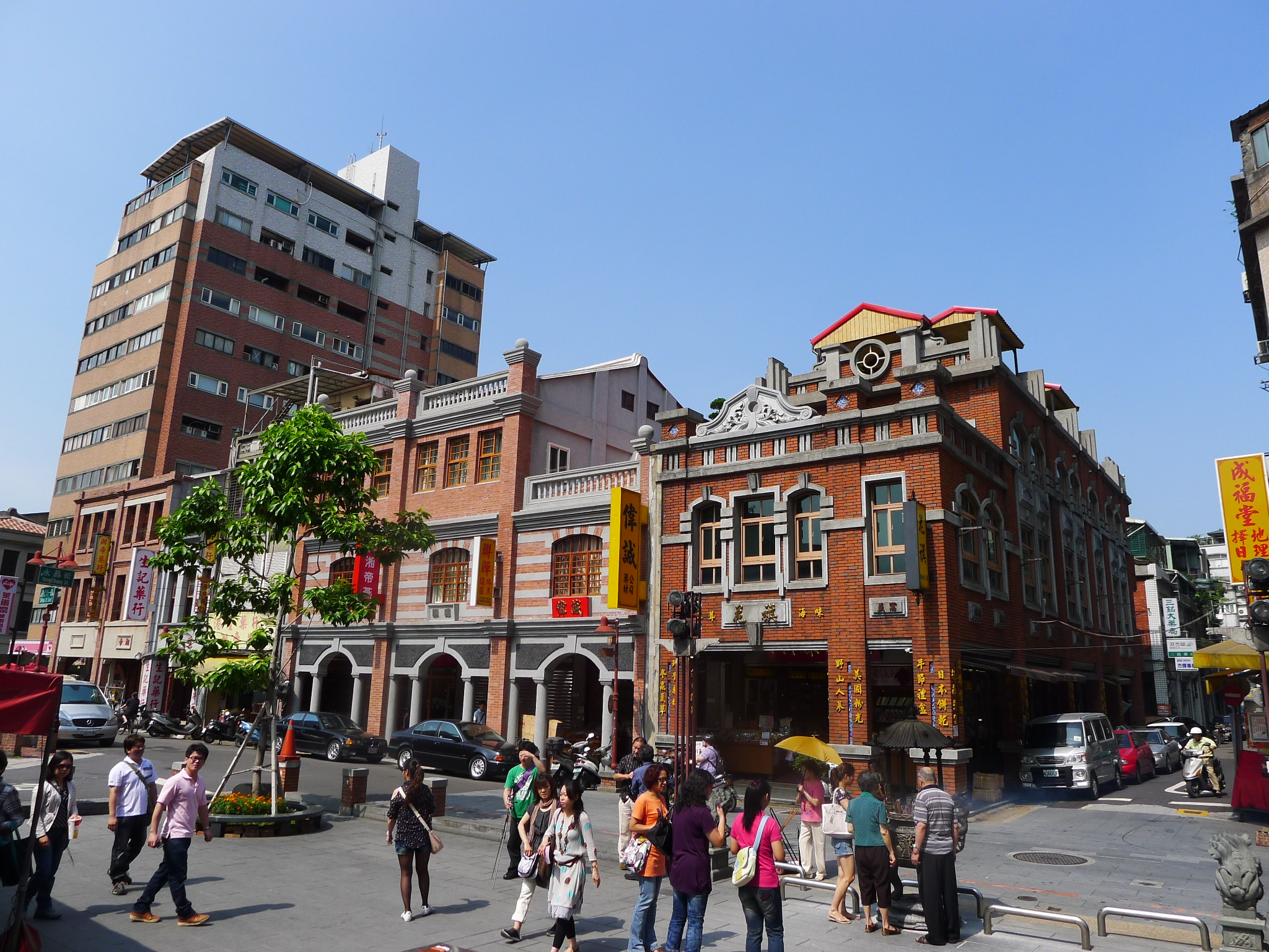 迪化街霞海城隍廟前